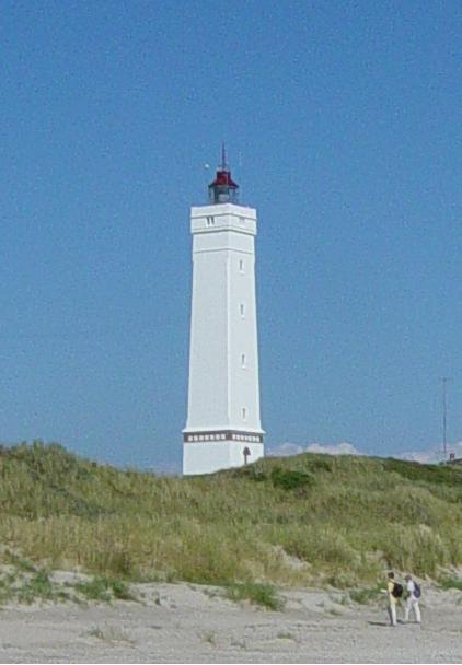 Blåvandshuk fyr